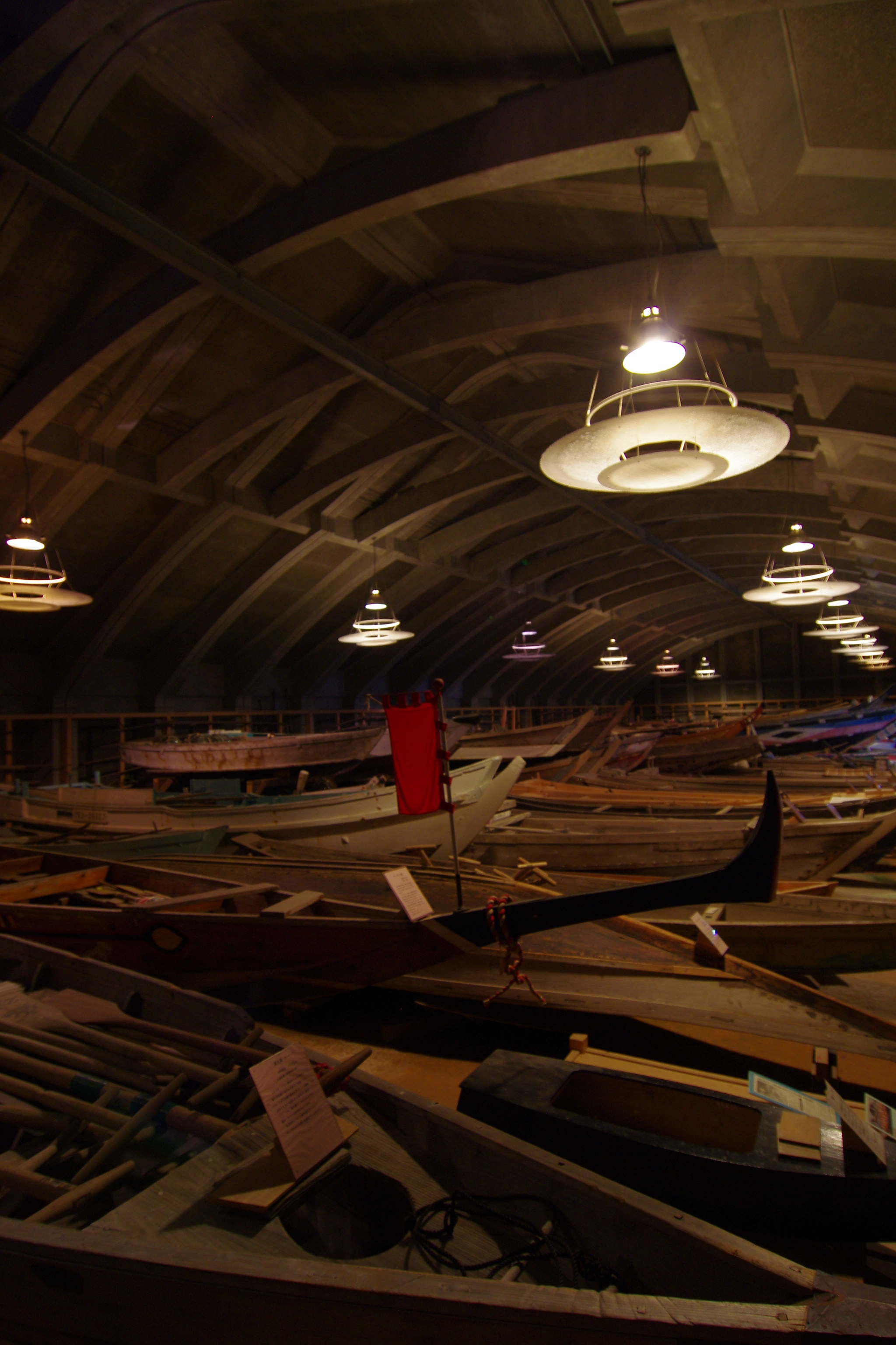 海の博物館重要文化財収蔵庫、内部